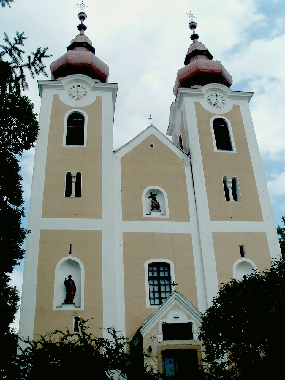 Nagykapornak, Szentséges Üdvözítő római katolikus templom